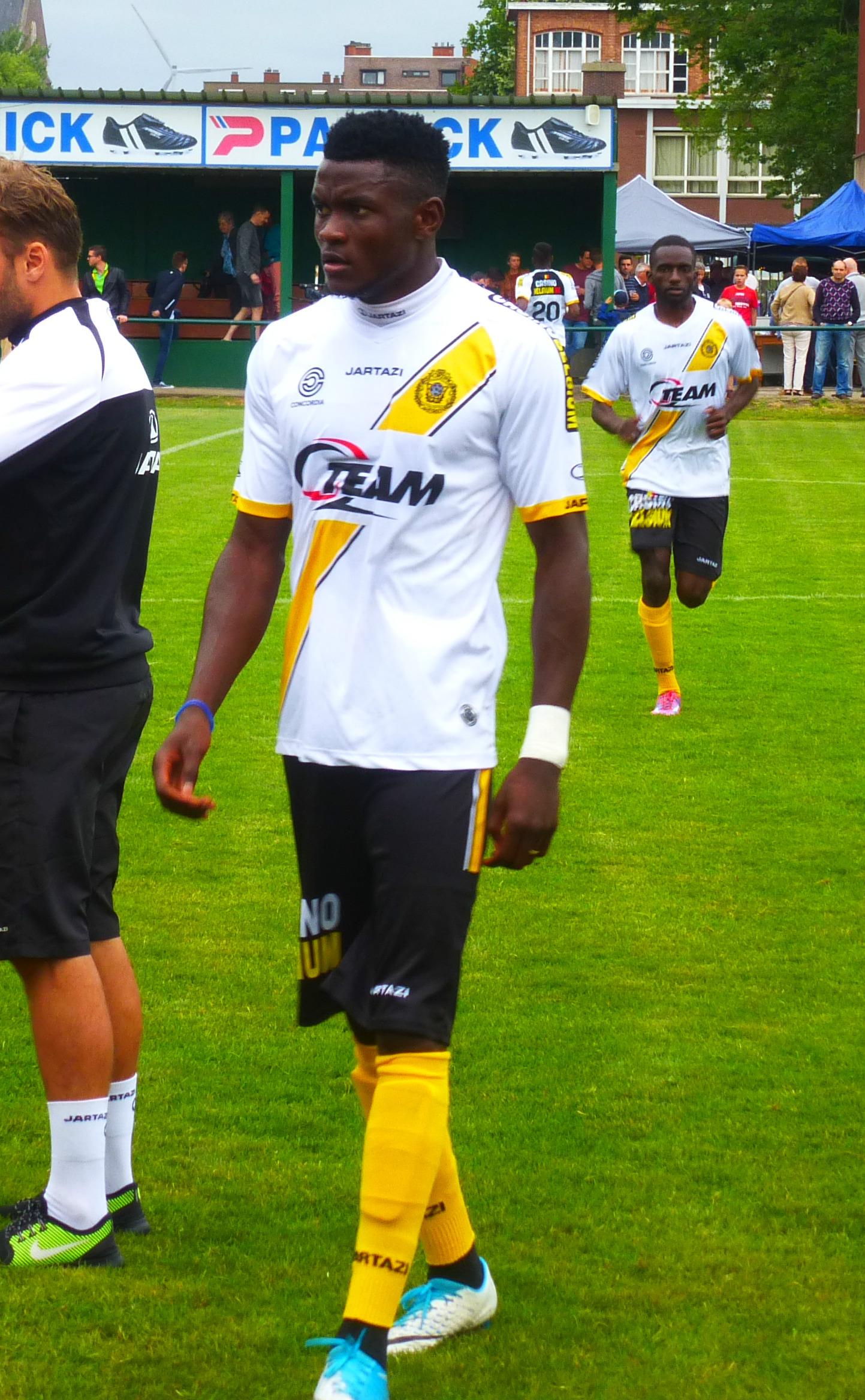 Lewis Enoh is een Kameroense voetballer